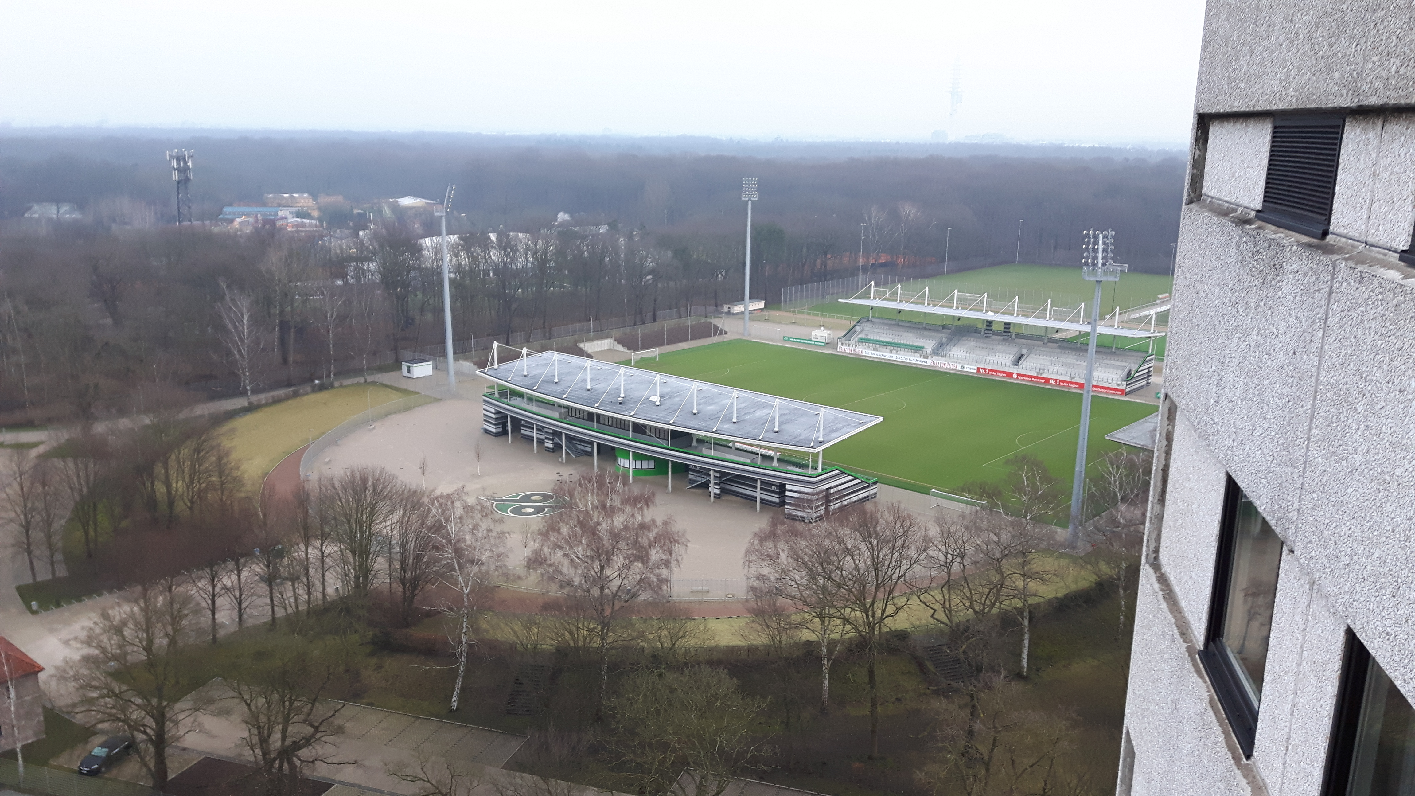 Das neue Eilenriedestadion (auch "96-das Stadion" genannt) in Hannover vom Turm des Congress-Hotels aus. Vorne im Eingangsbereich Reste der alten Laufbahn sowie die früheren Stehplatztribünen, jetzt ein begrünter Wall.